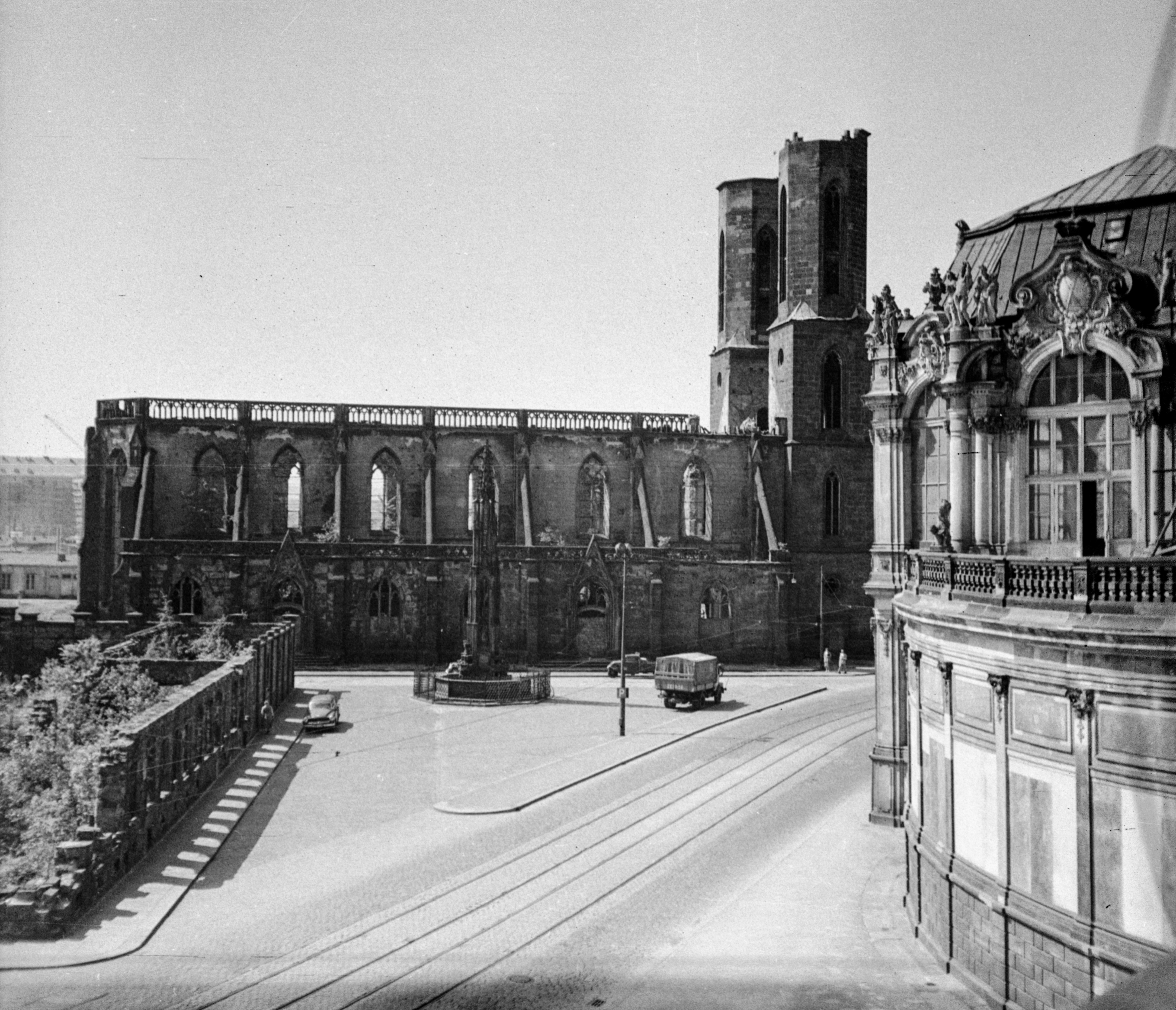 Sophienstrasse, szemben a Sophienkirche, jobbra a Zwinger. Location: Germany, Dresden Tags: church, damaged building, war damage, GDR, street view, commercial vehicle, automobile, monument Title: Sophienstrasse, szemben a Sophienkirche, jobbra a Zwinger.